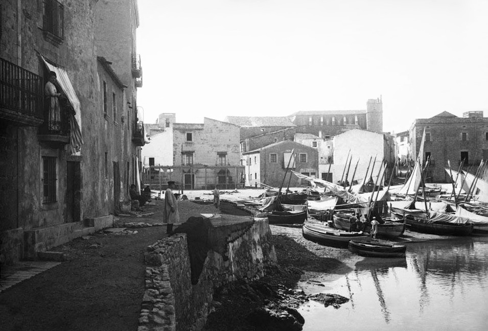 Imatge